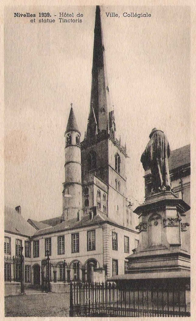 Statue de Johanness Tinctoris (né vers 1435 à Braine-l'Alleud, décédé en 1511) érigée à Nivelles en Brabant Wallon (Belgique). arrière plan, la Collégiale Ste Gertrude avec son ancien clocher, toiture en pointe.